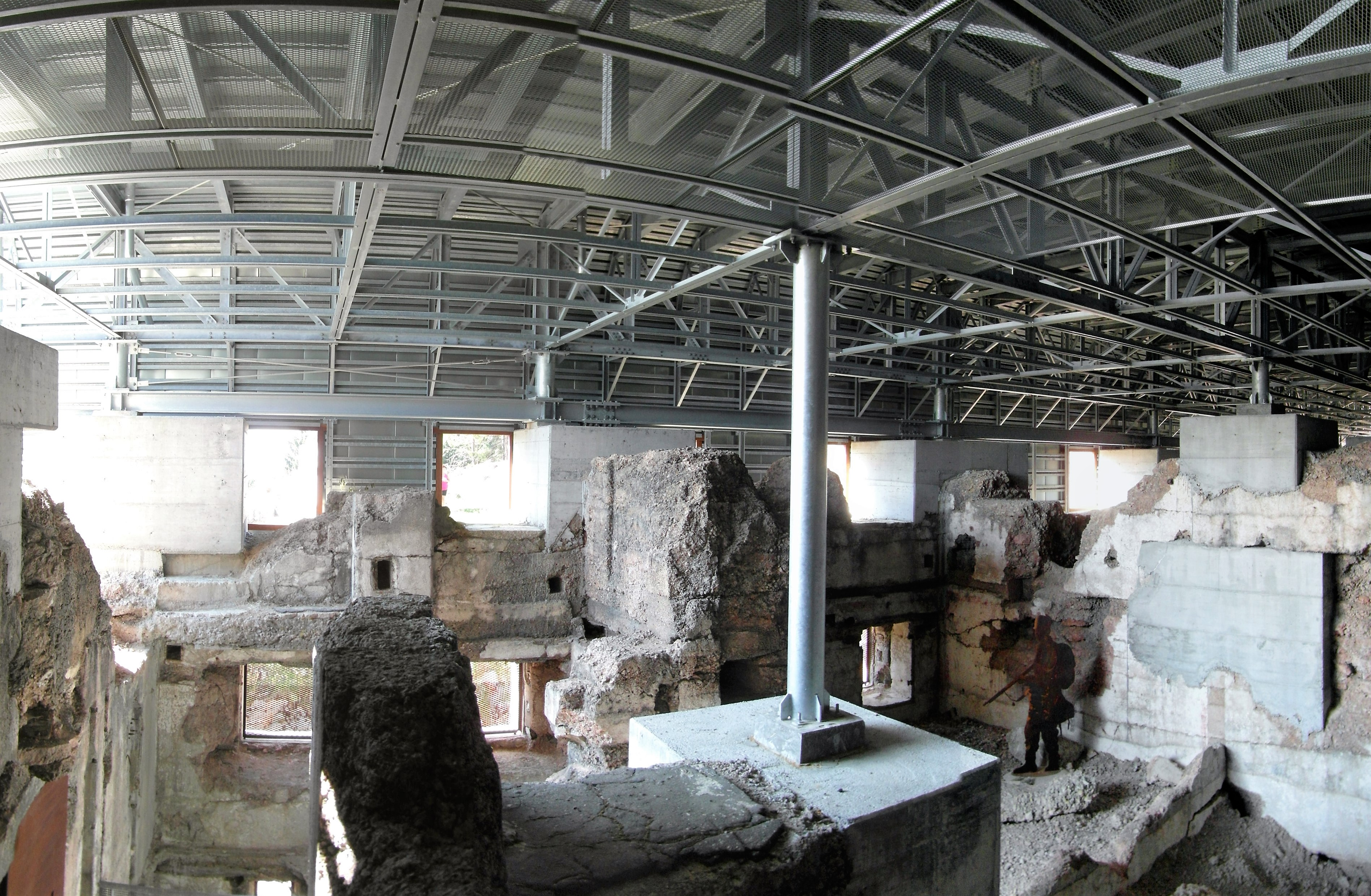 Forte Campo Luserna